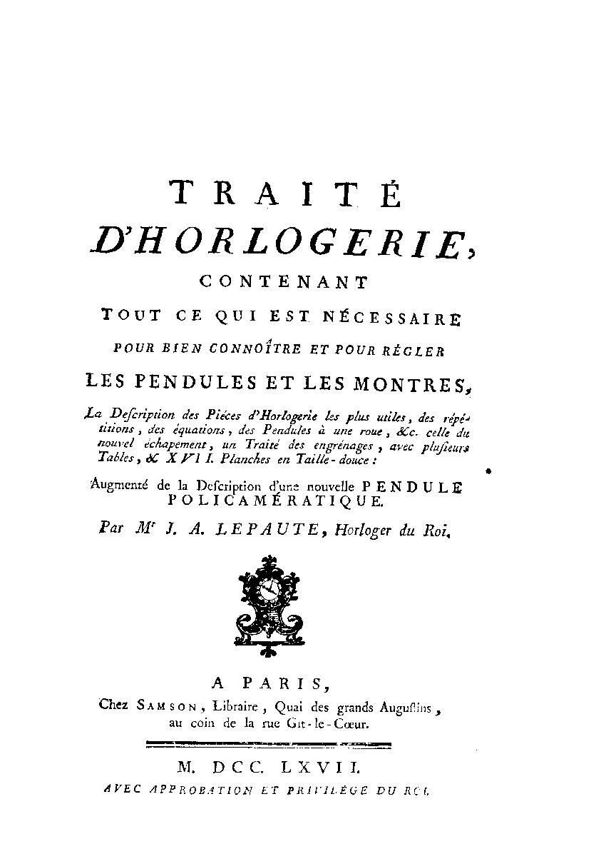 Traité d'horlogerie, contenant tout ce qui est nécessaire pour bien connoître et pour régler les pendules et les montres, la description des piéces d'horlogerie les plus utiles, des répétitions, des équations, des pendules à une roue, &c. celle du nouvel échapement, un traité des engrénages, avec plusieurs tables, & 17. planches en taille-douce ... par m. J.A. Lepaute .... - A Paris : chez Samson libraire, quai des grands Augustins, au coin de la rue Git - le - Coeur, 1767 ([Parigi] : de l'imprimerie de Jacques Chardon, rue Garlande vis-à-vis la rue du Fouare). - [4], XXVIII, 93, [4], 96-308, 12, 4, XXXV, [1] p., XVII c. di tav. calcografiche : ill. calcografiche ; 4º .